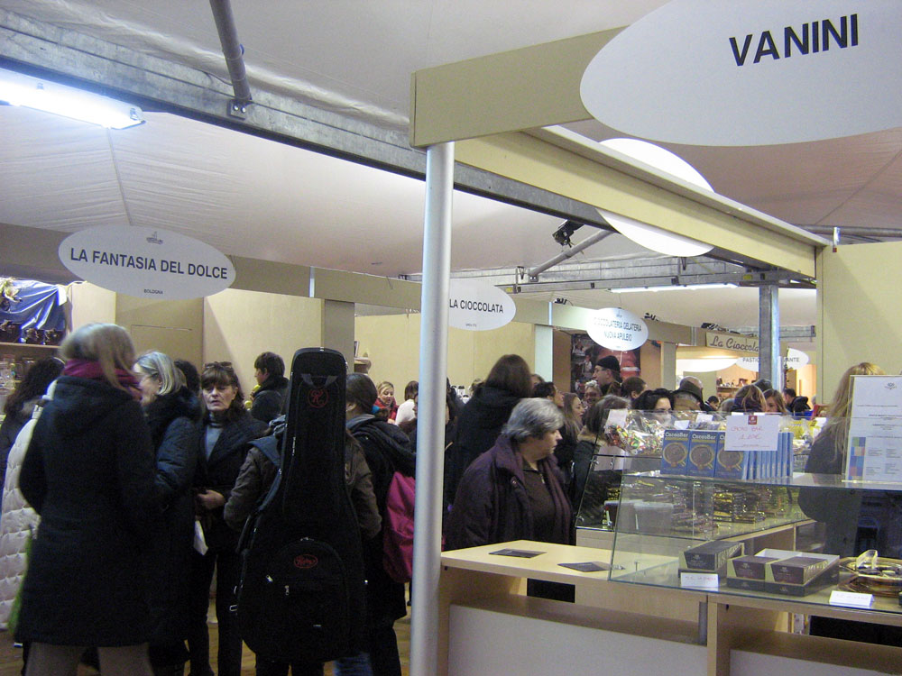 Foto del Cioccoshow 2007, en la ciudad de Bolonia